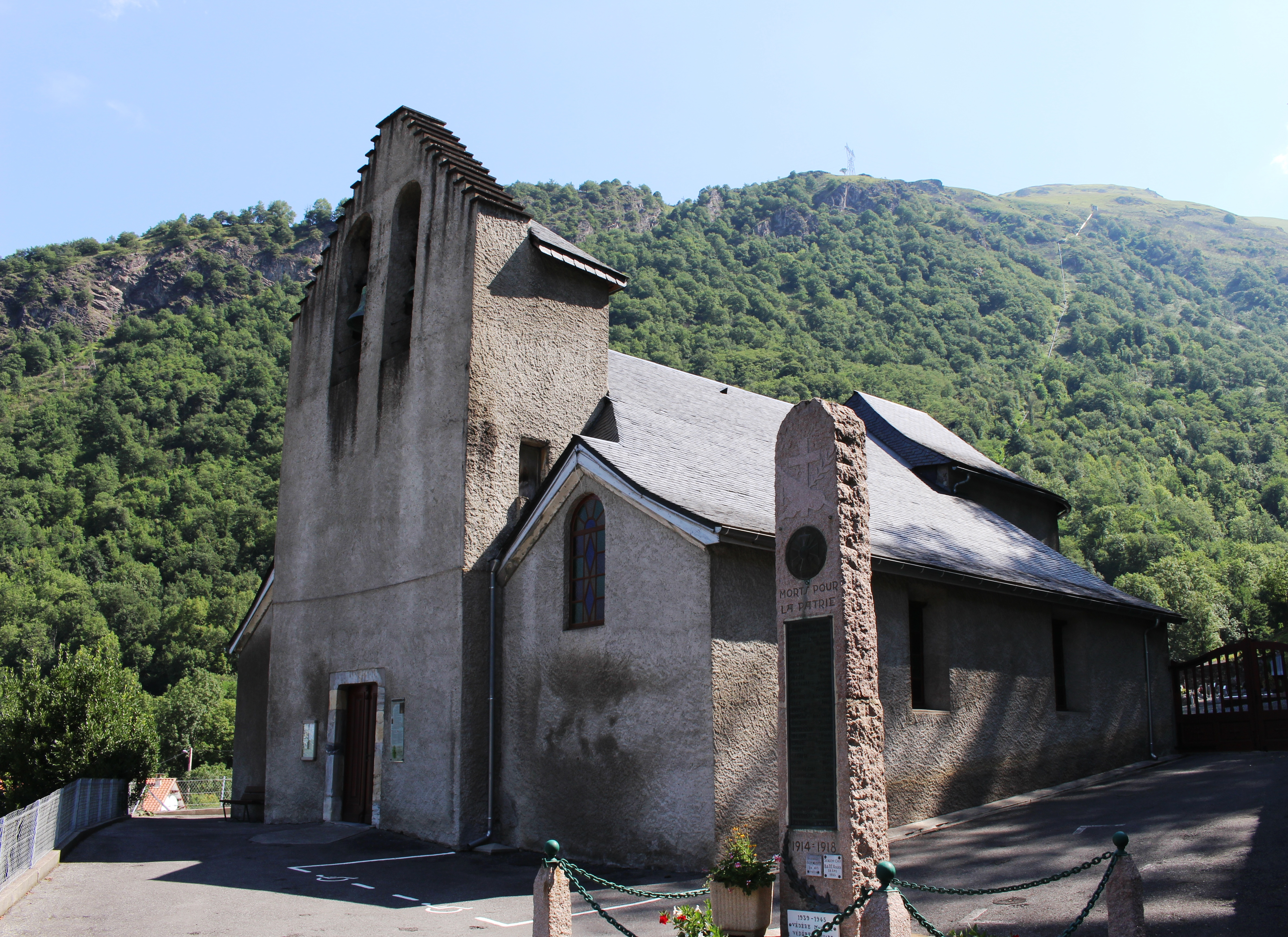 Église Saint-Martin de Villelongue (Hautes-Pyrénées)